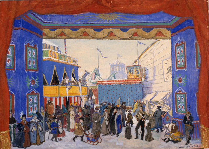 Бенуа Александр Николаевич. Комната Черномора. Эскиз декорации к «Петрушке» И.Стравинского. 1911